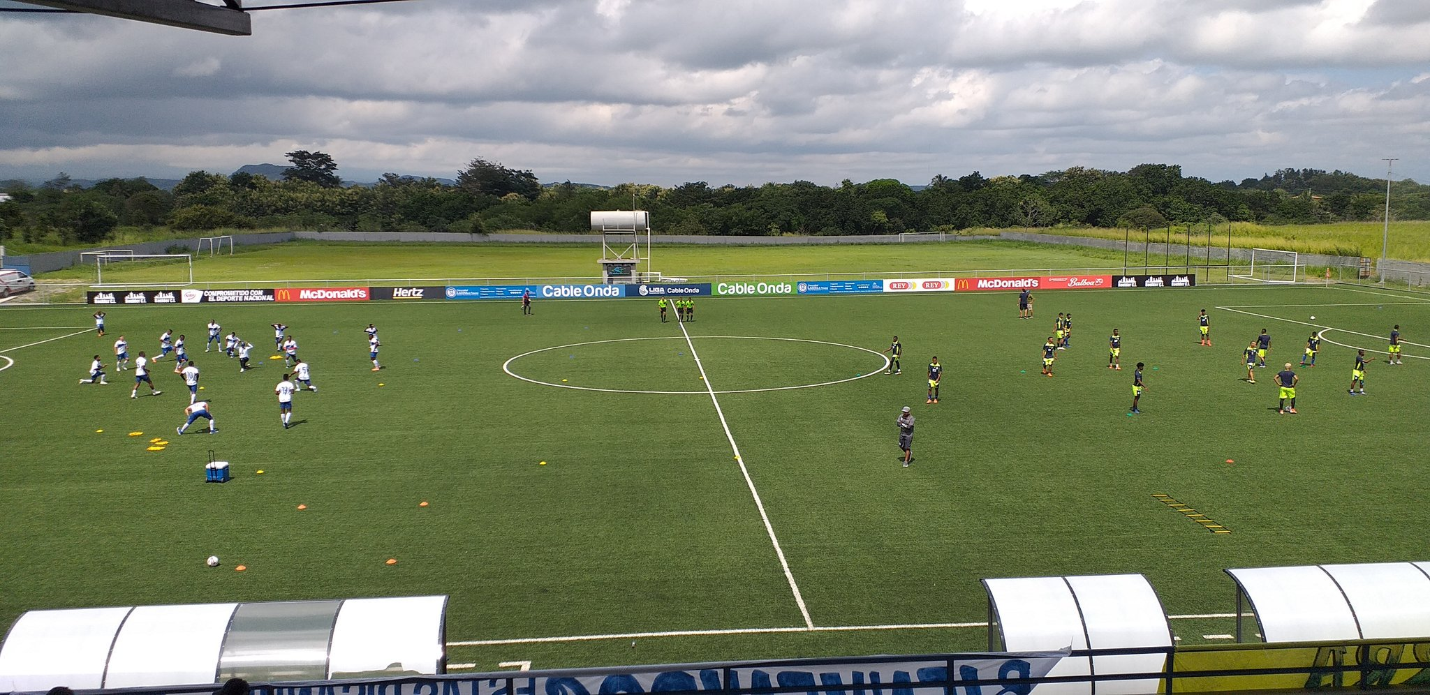 recinto deportivo de la cuidad de Penonomé